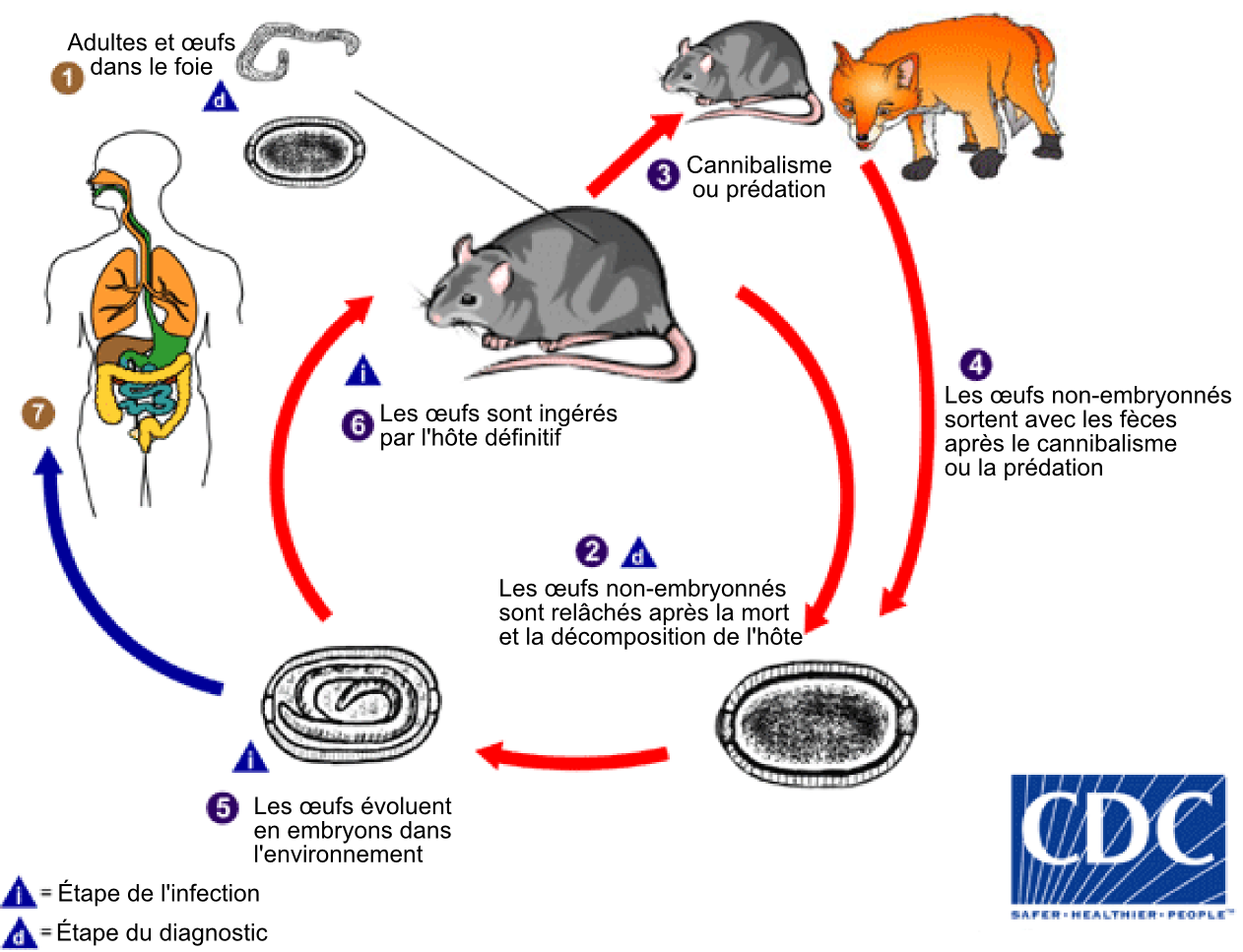 Capillaria hepatica = Calodium hepaticum lifecycle